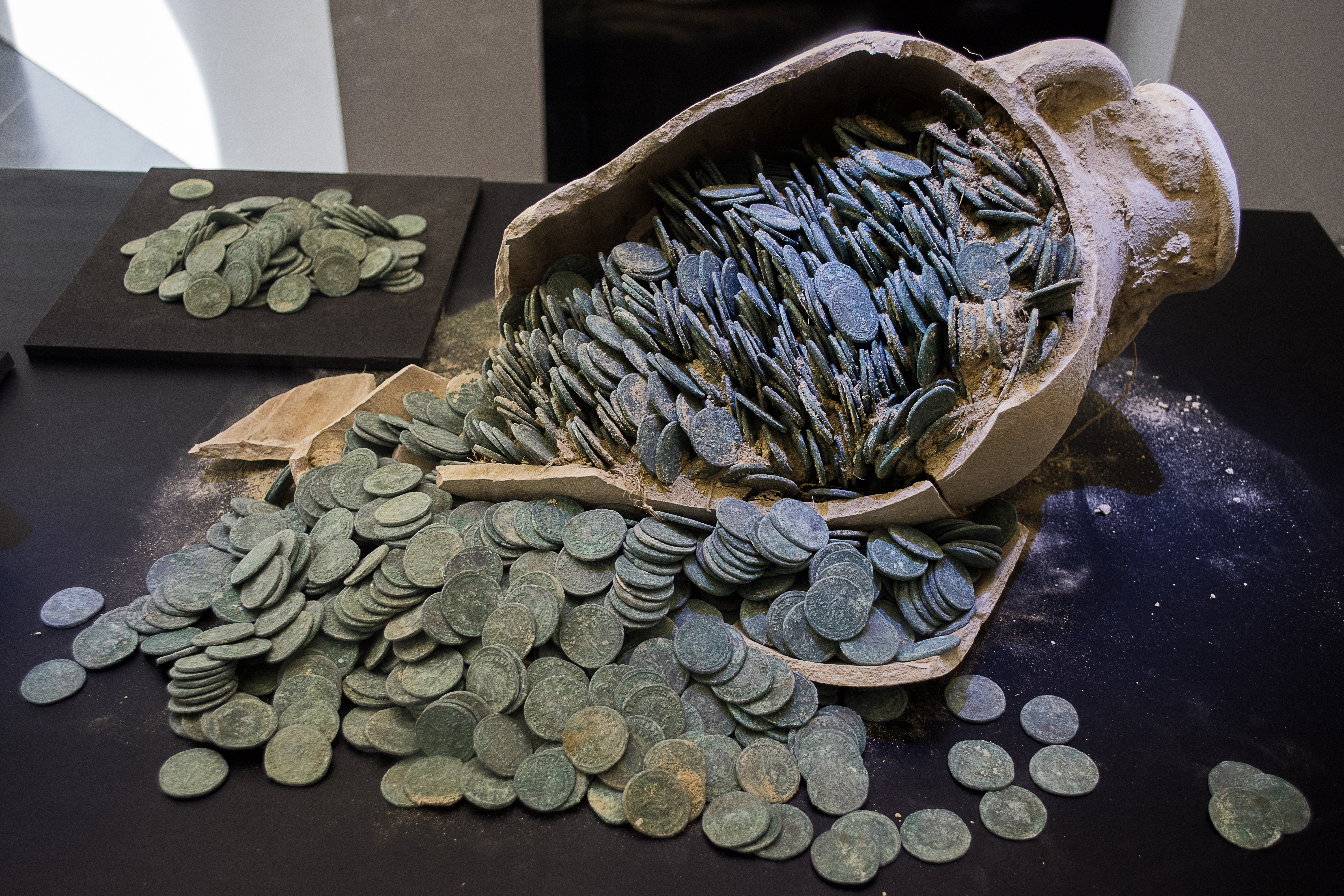 Ánfora con monedas del tesoro del carambolo. Exposición Museo Arqueológico de Sevilla 2017.